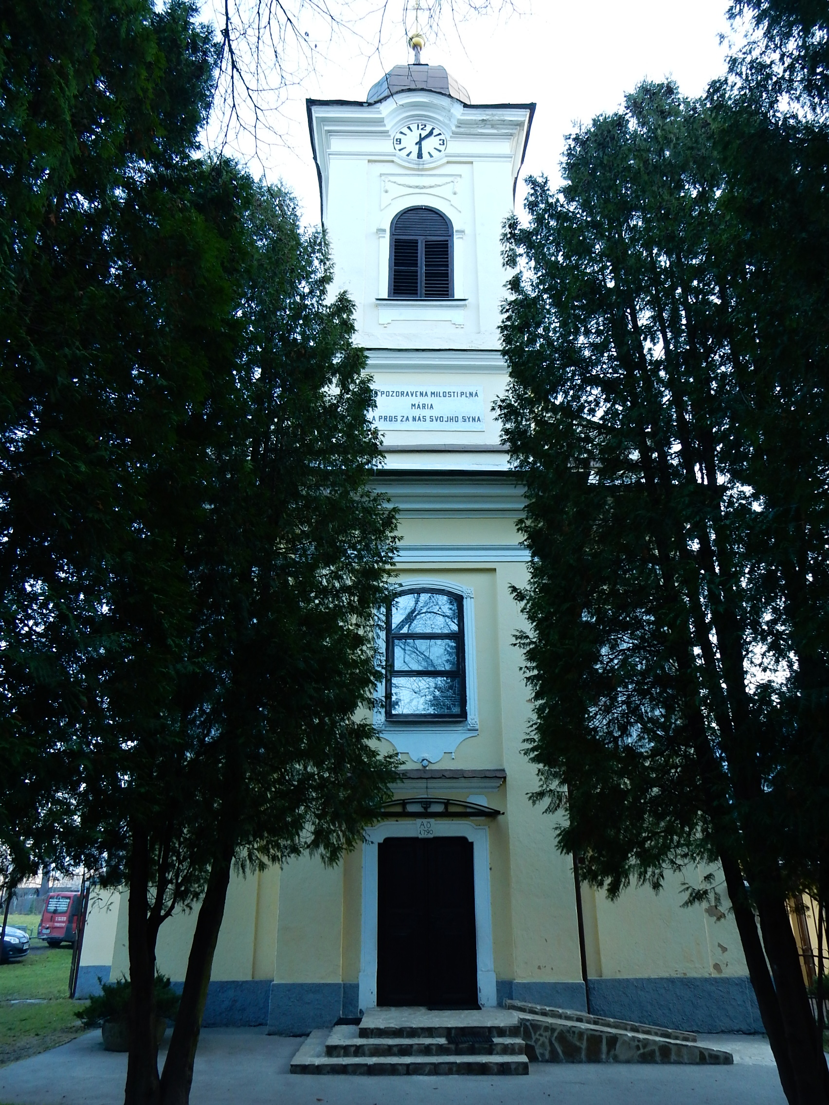 Kostol